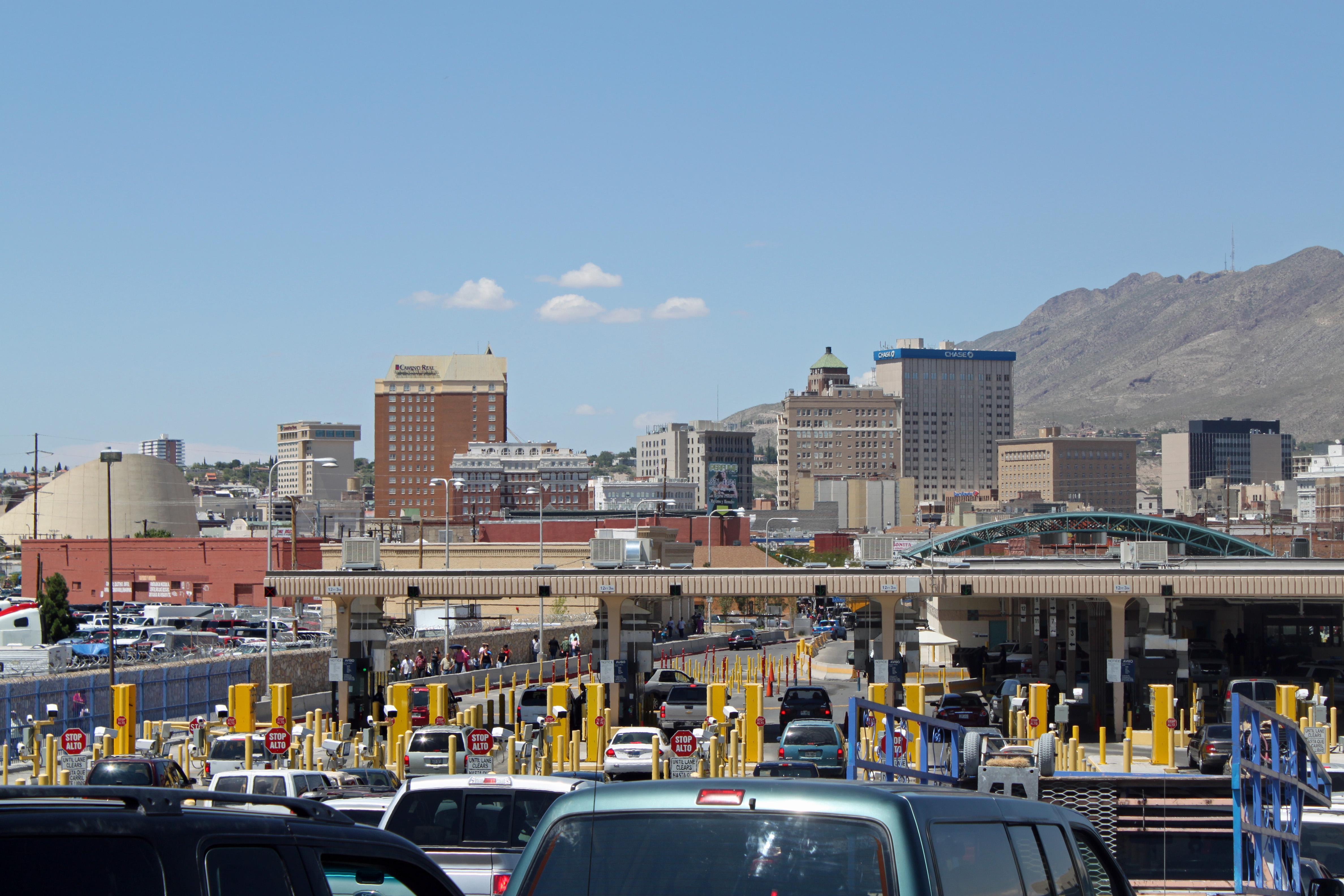 Mexico 2010, Ciudad Juárez, Mexico